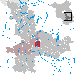 Schlepzig in Brandenburg (Country) - District Dahme-Spreewald